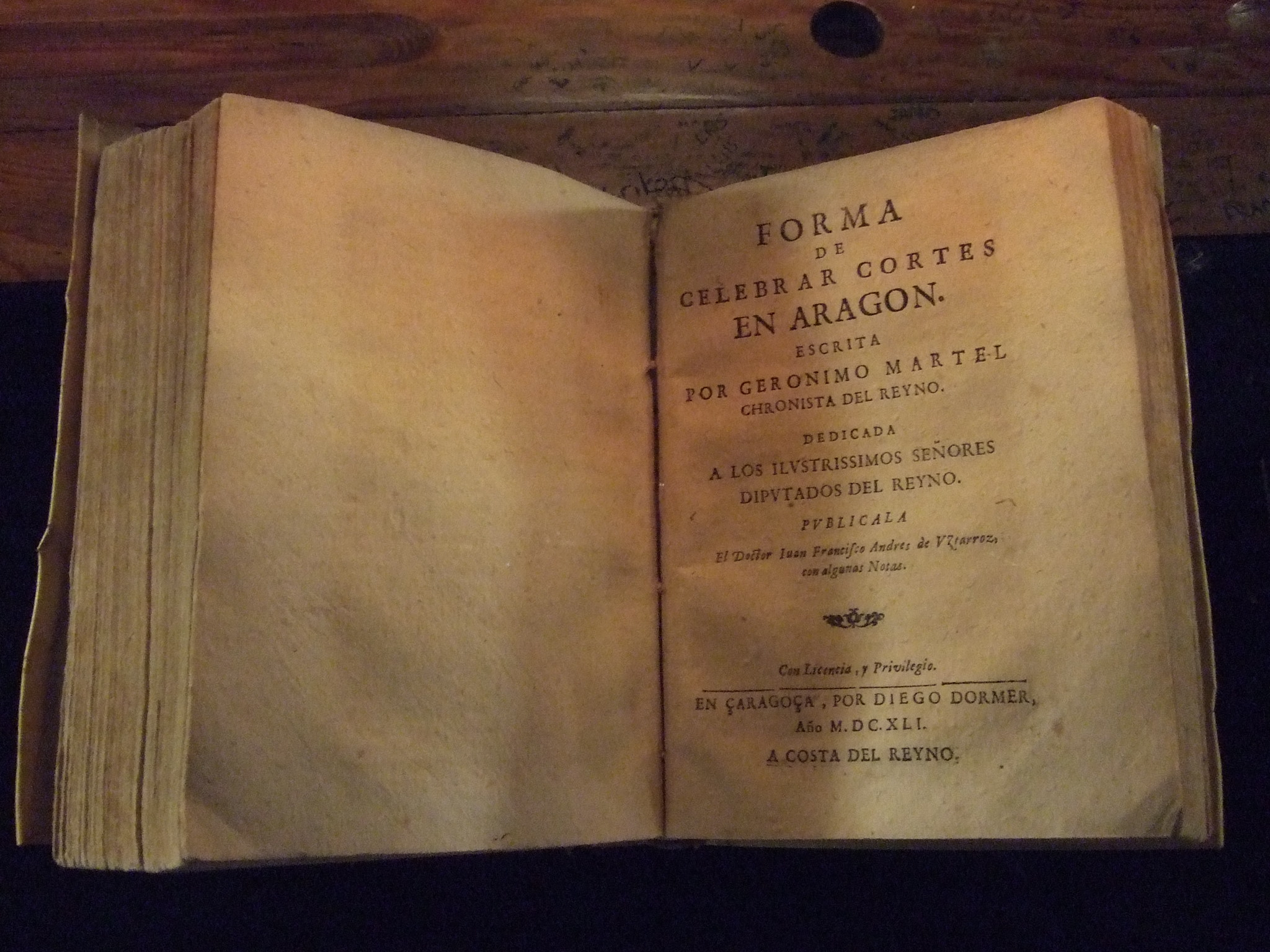 Martel, Jerónimo Forma de celebrar cortes en Aragon / escrita por Geronimo Martel chronista del Reyno ...; publicala ... Juan Francisco Andres de Uztarroz con algunas notas [ En Çaragoça: por Diego Dormes, 1641